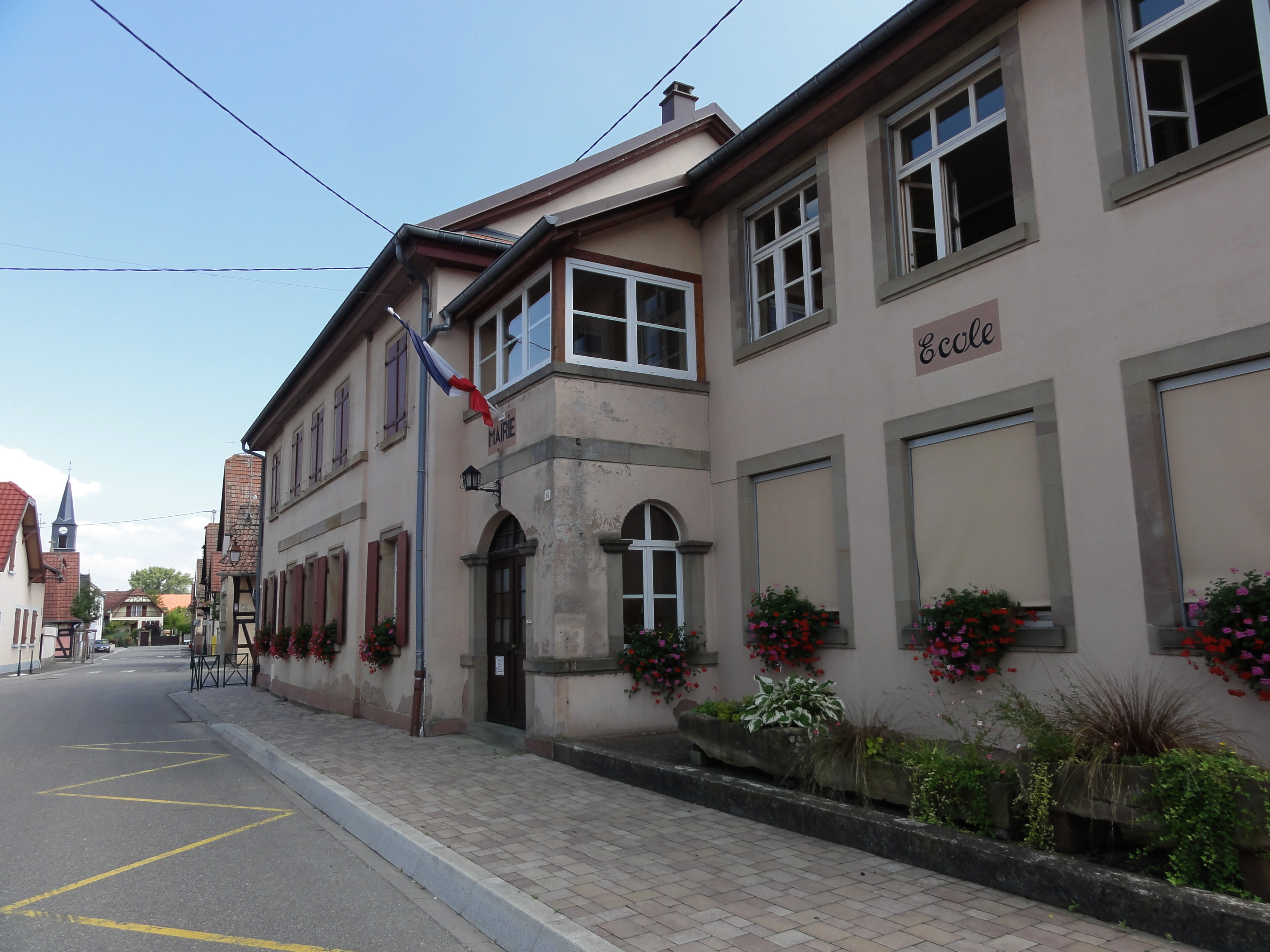 Alsace, Bas-Rhin, Hipsheim, Mairie.